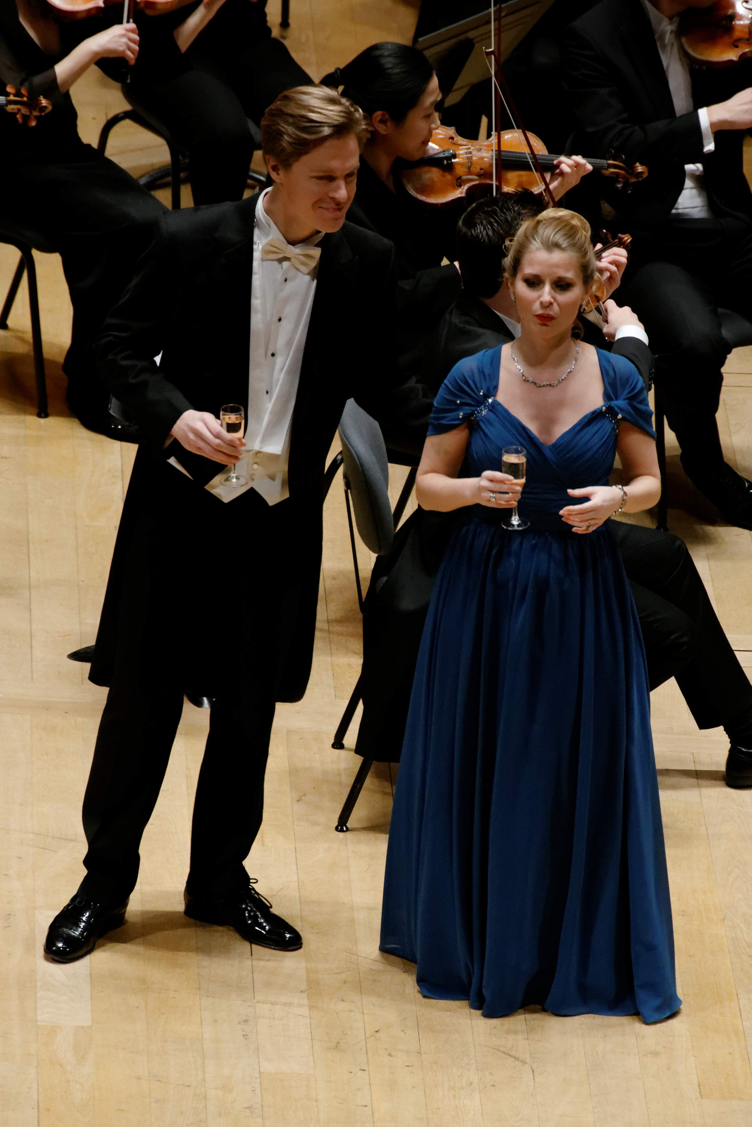 Georg Klimbacher (Baryton) et Beate Ritter (Soprano) interprétant l'air du Champagne d'Orlofsky (Im Feuerstrom der Rebens) de "La Chauve-souris" (Die Fledermaus), opérette de Johann Strauss II. Auditorium Maurice-Ravel, Lyon